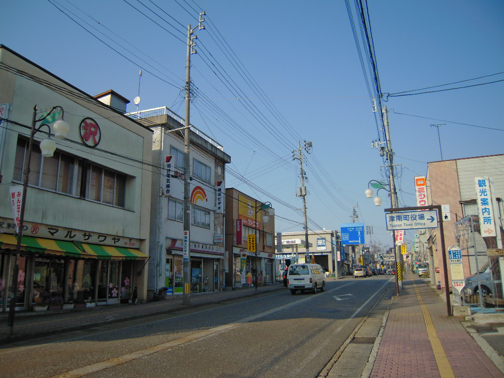 津南市街（津南町役場付近）